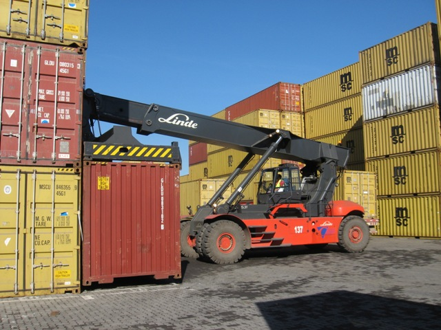 Wandel der Hafenarbeit durch die Containerisierung